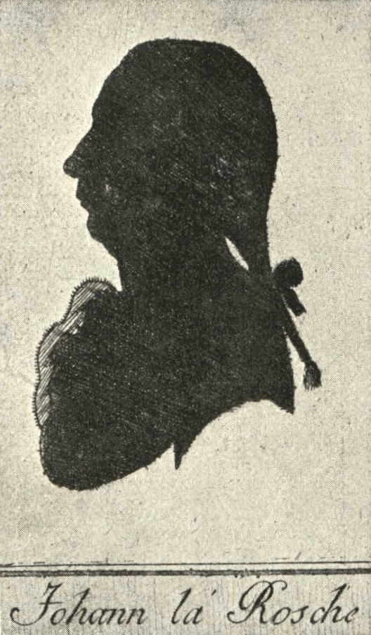 „Johann la Rosche“. Silhouette von Hieronymus Löschenkohl. Sammlung Max von Portheim Johann La Roche (1735–1806), Austrian actor and writer